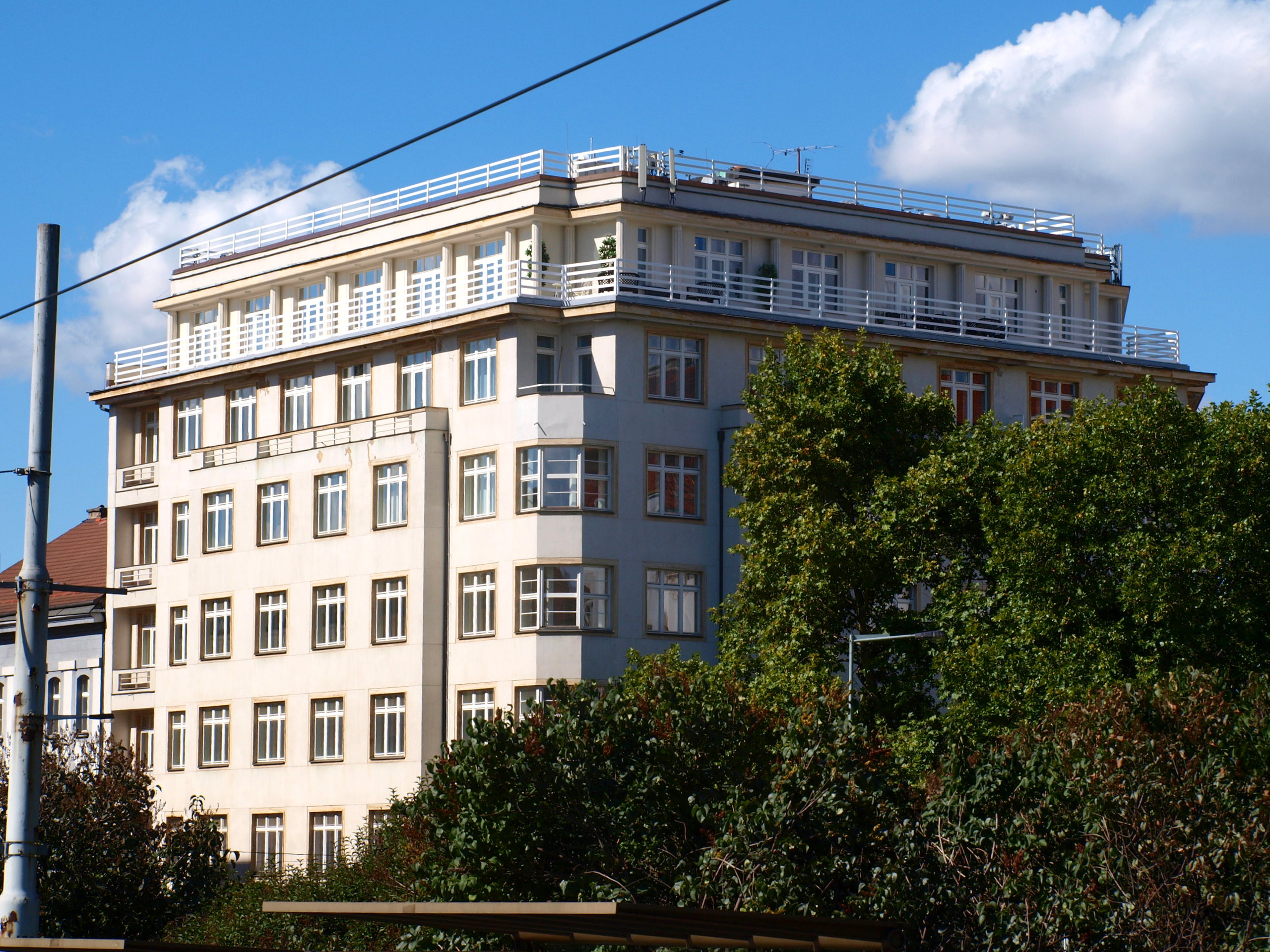 Praha, Náměstí Míru 1 + Jugoslávská 29